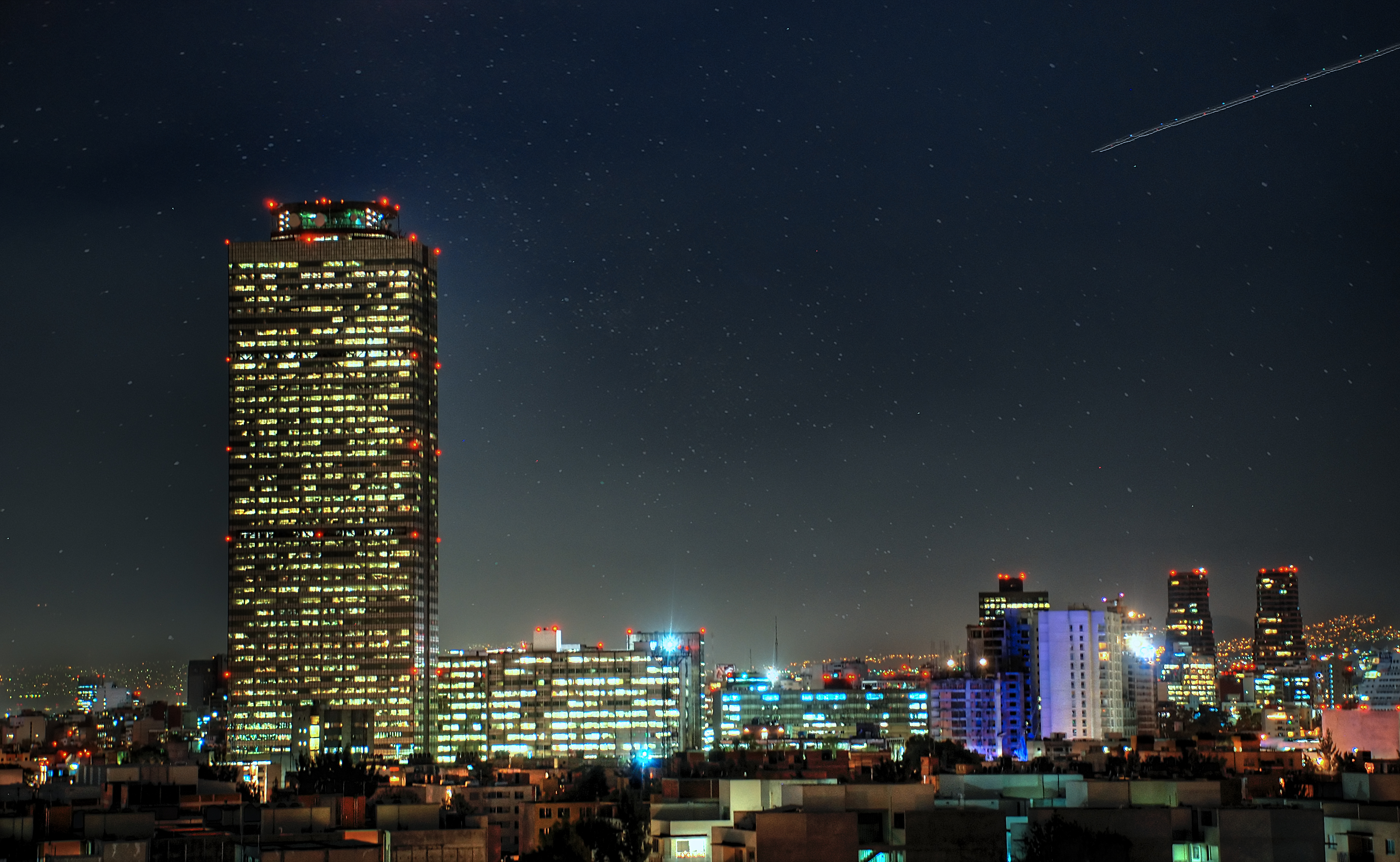 Torre Pemex de Noche.